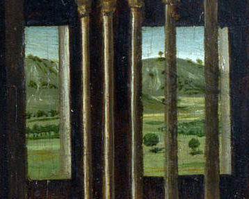 Blick aus Fenstern in Antonello da Messinas Gemälde Der heilige Hieronymus im Gehäuse